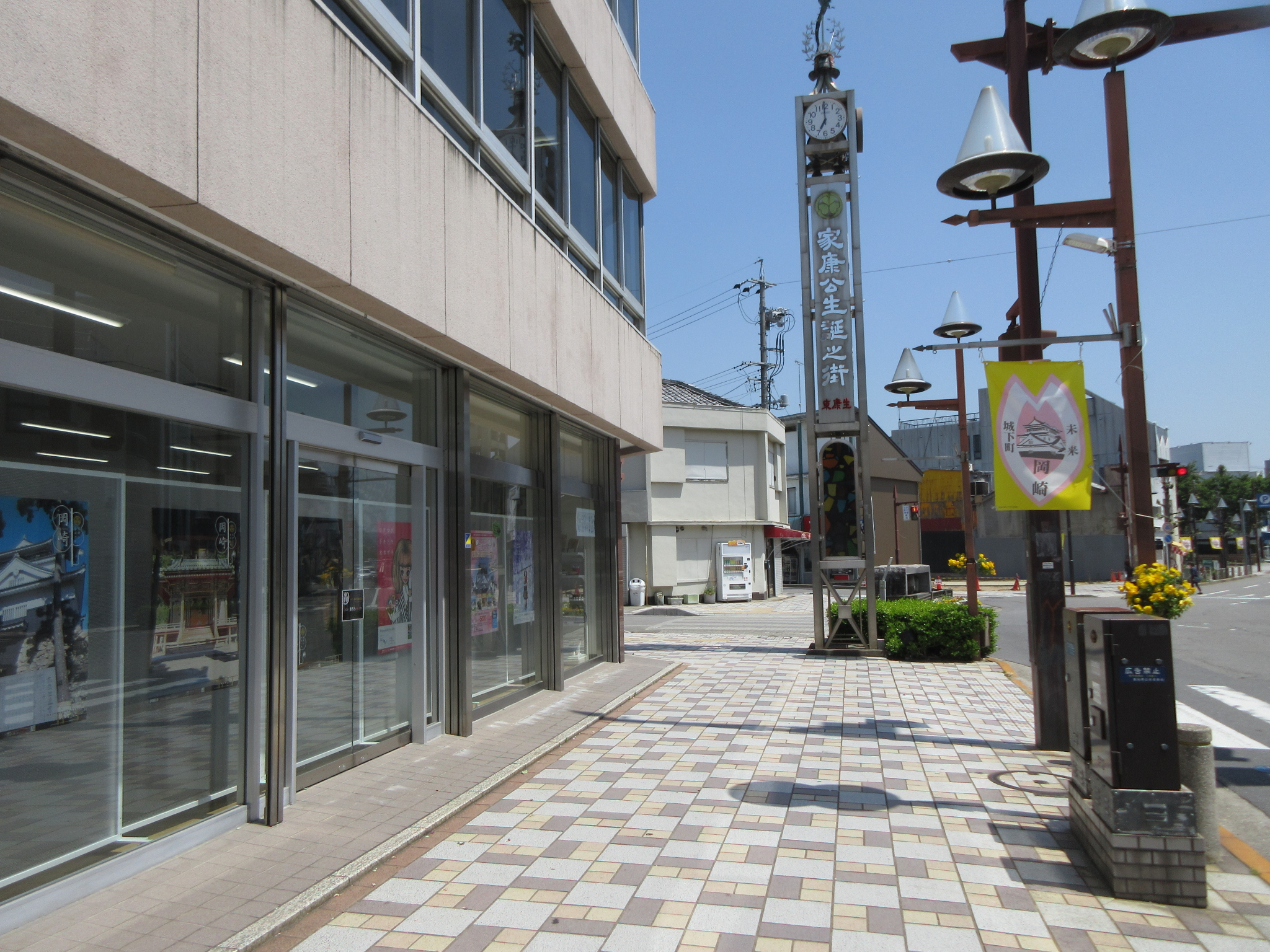 一般社団法人岡崎市観光協会（岡崎市康生通東）